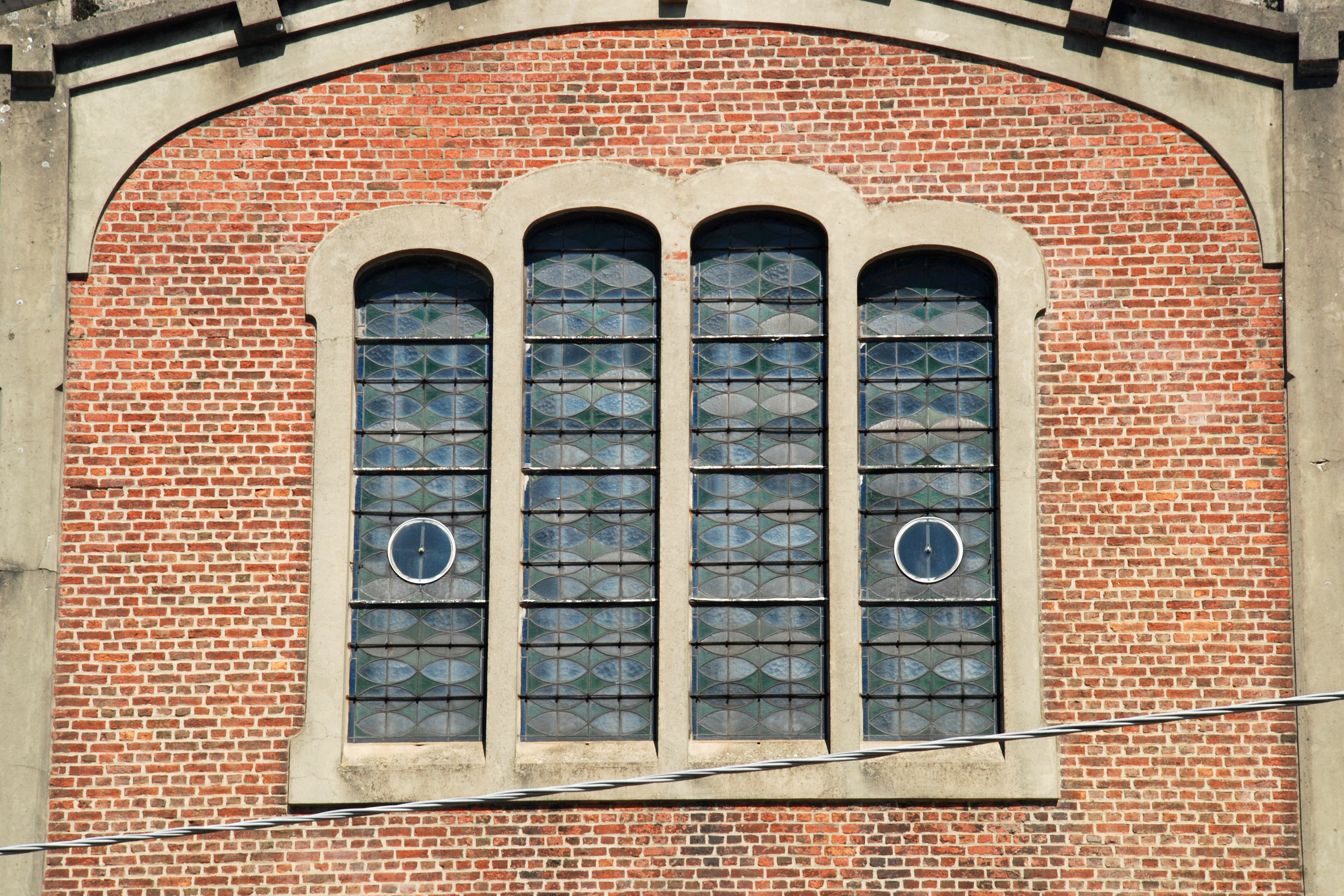 Belgique - Brabant wallon - Rixensart - Genval - Église Saint-Pierre de Maubroux